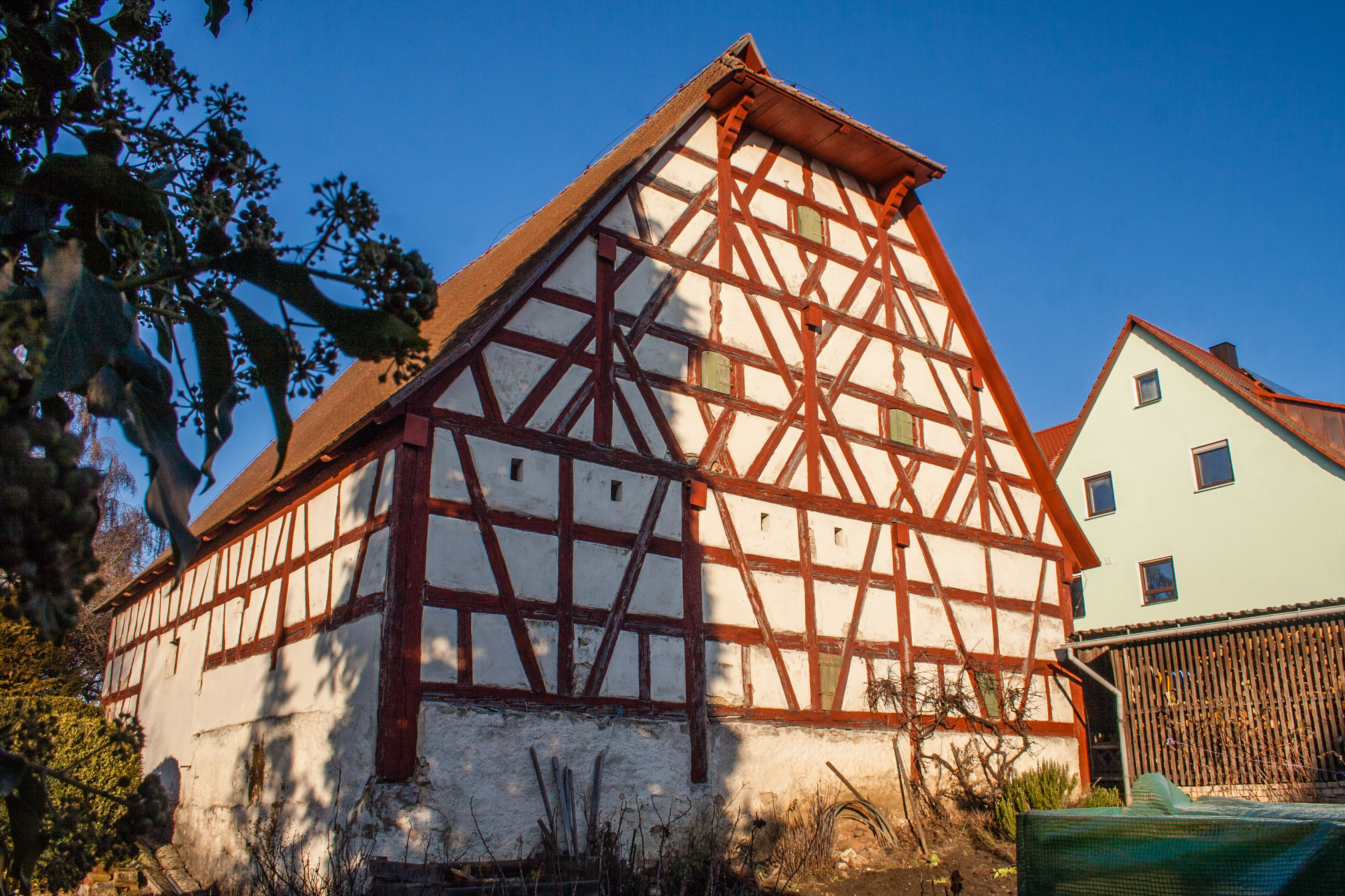 Scheune, Oberhaidelbach, Leinburg, Fachwerkbau auf Steinsockel, Schopfwalmdach, wohl erste Hälfte 18. Jahrhundert